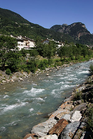 Poschiavino in Poschiavo